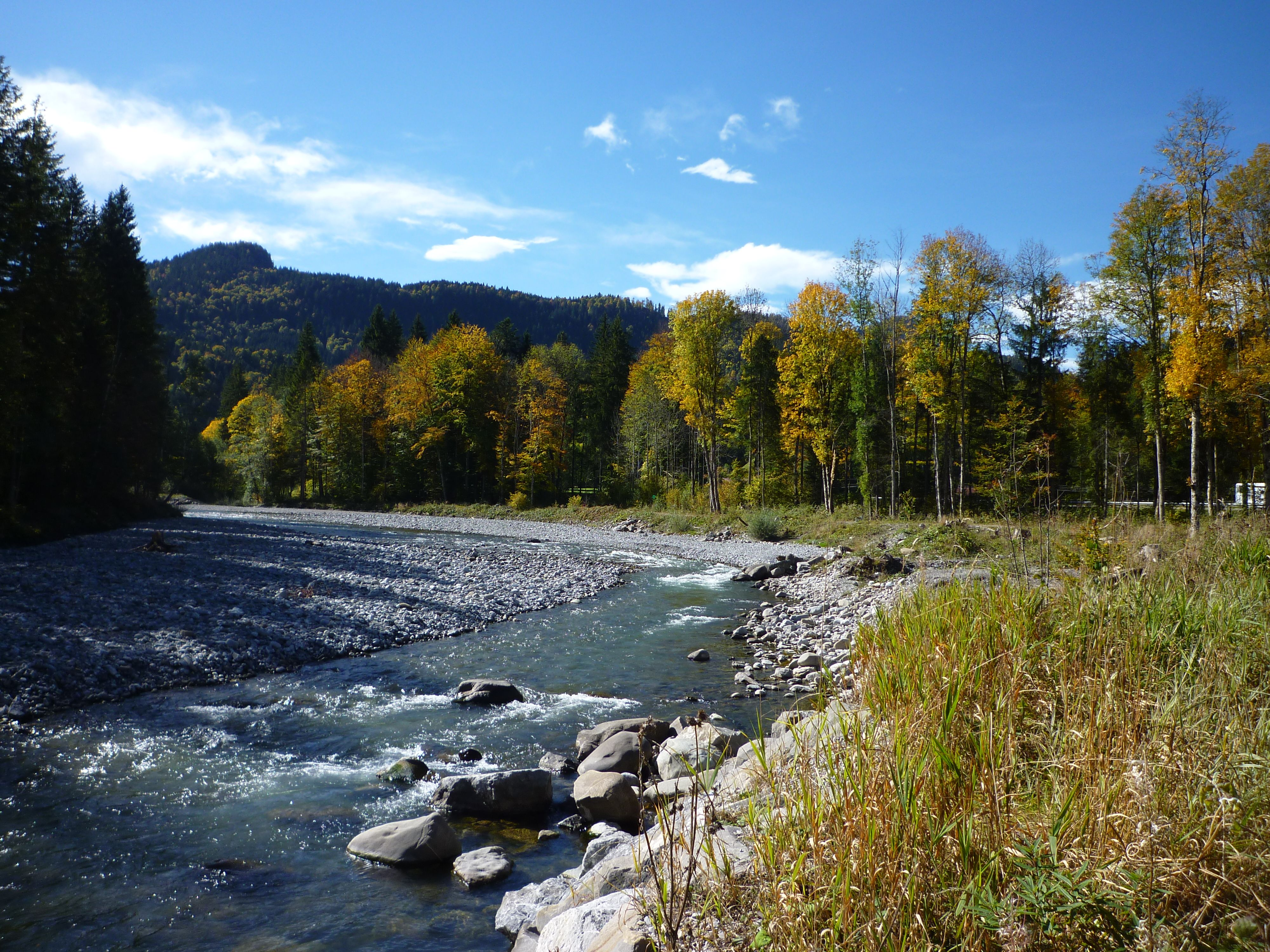 Oberstdorf - Breitach bei Weidach, Sicht nach Westen